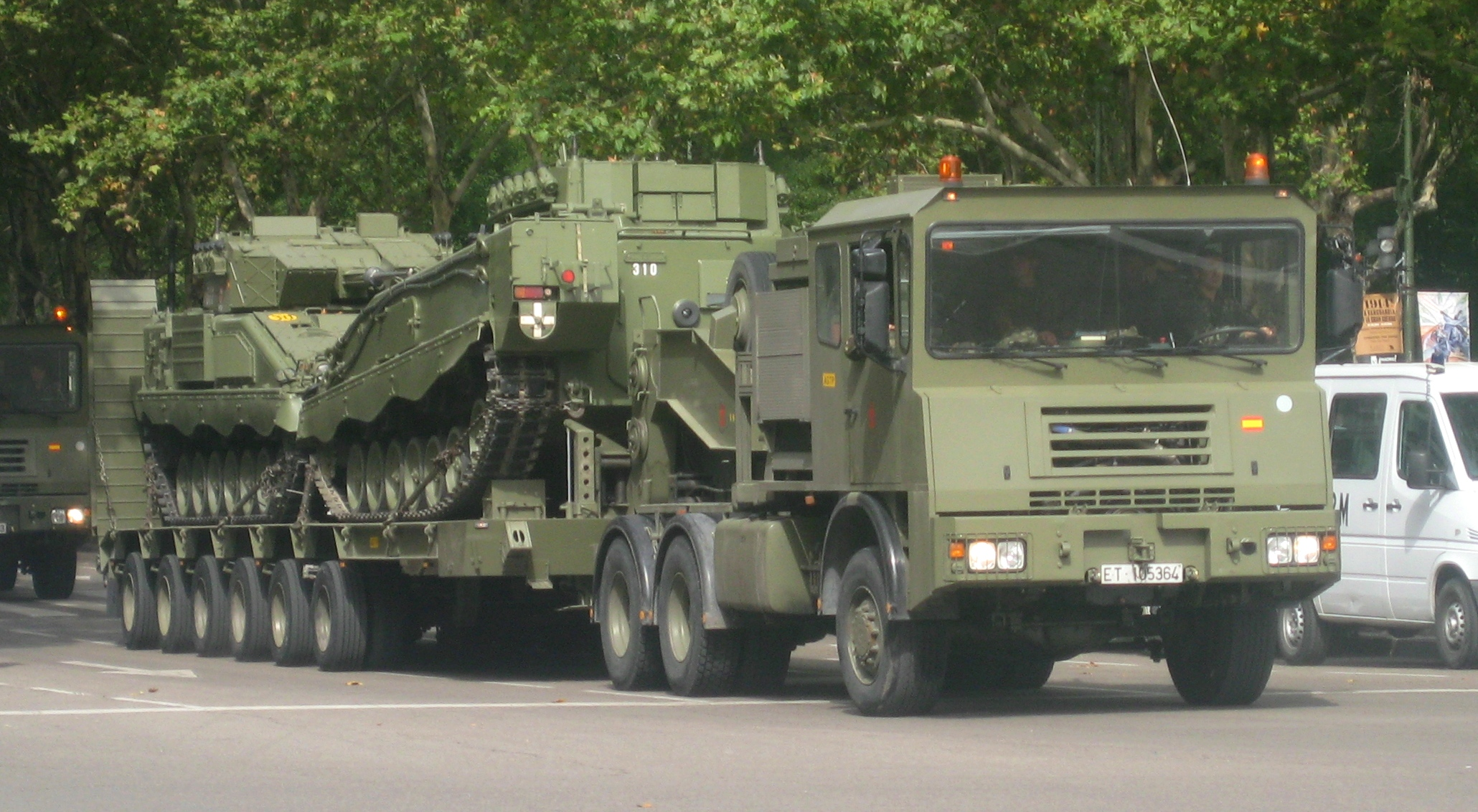 Kynos Aljaba K-15-100 del E. T. Español transportando dos Pizarros.